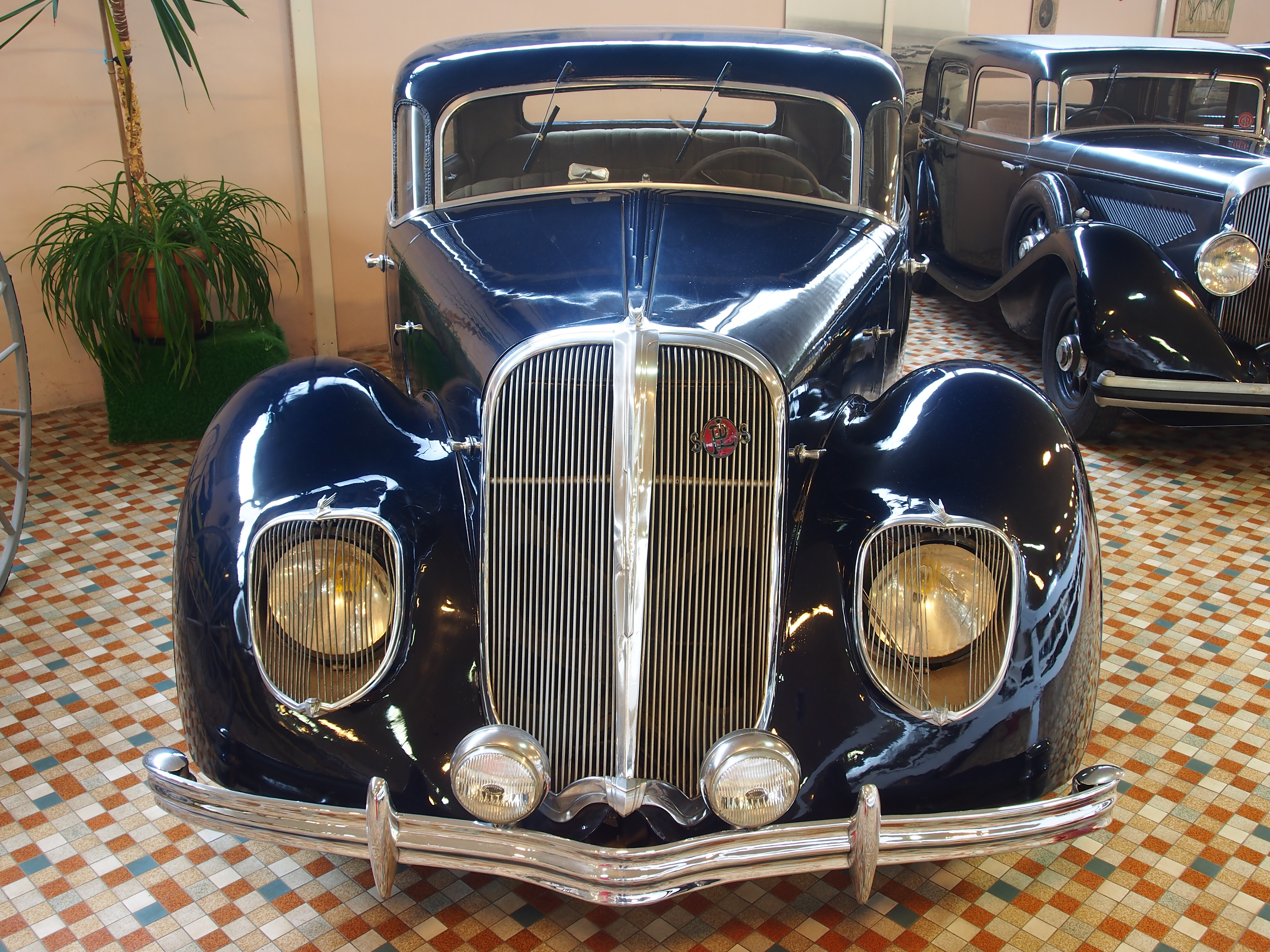 Photographed at the Musée Automobile de Vendée, France.